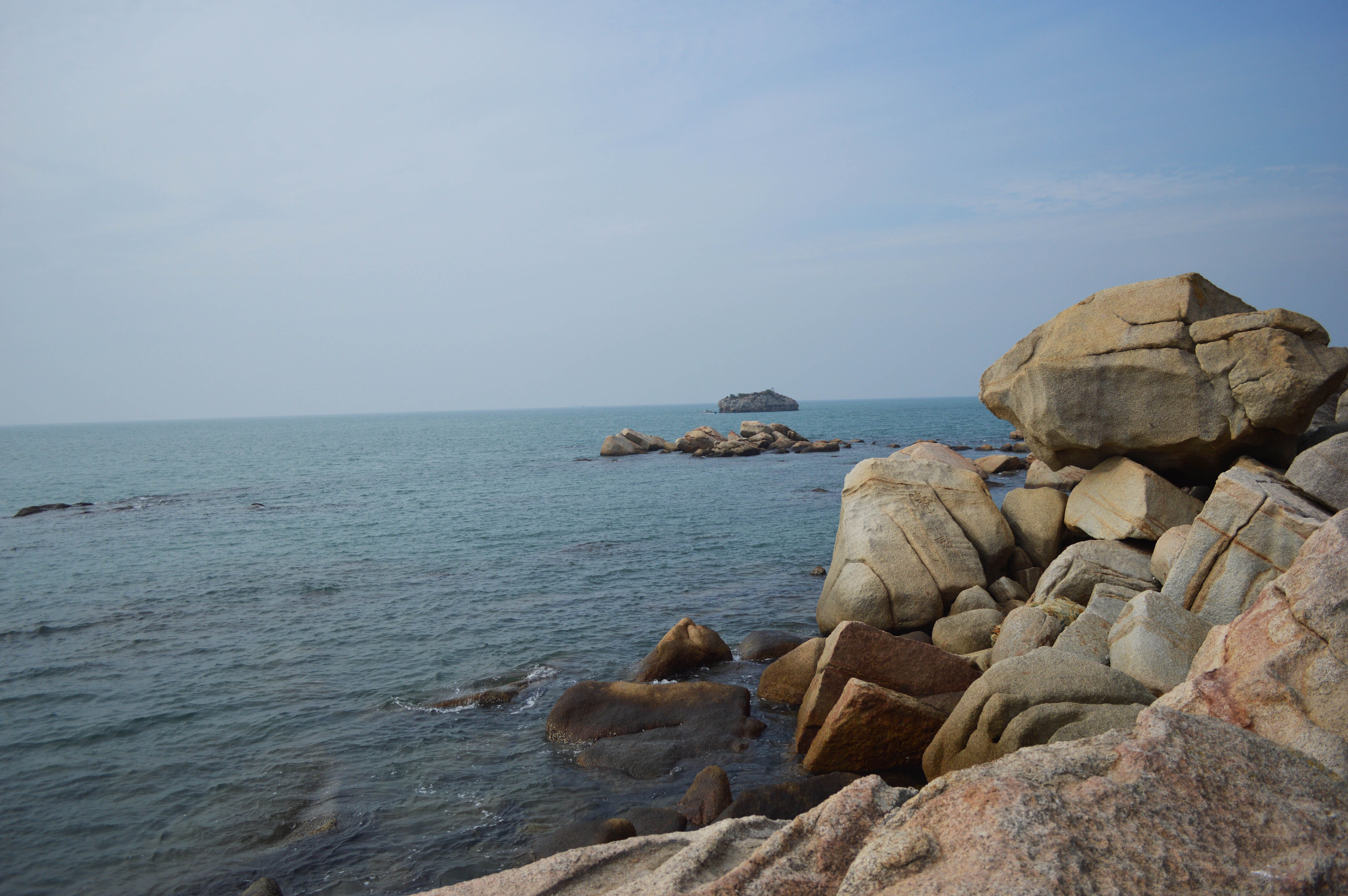 广东省惠东县巽寮湾